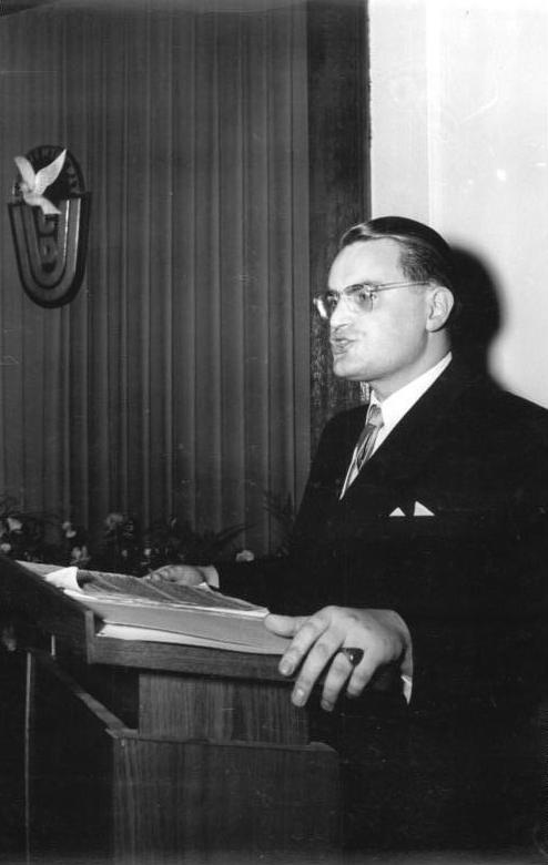 Zentralbild Gielow Me-Ho. 23.2.1953 Festsitzung des Hauptvorstandes der CDU zu Ehren des 70. Geburtstages von Otto Nuschke am 22.2.53 in Berlin UBz: Der Generalsekretär der CDU, Gerald Götting, hält die Festansprache.